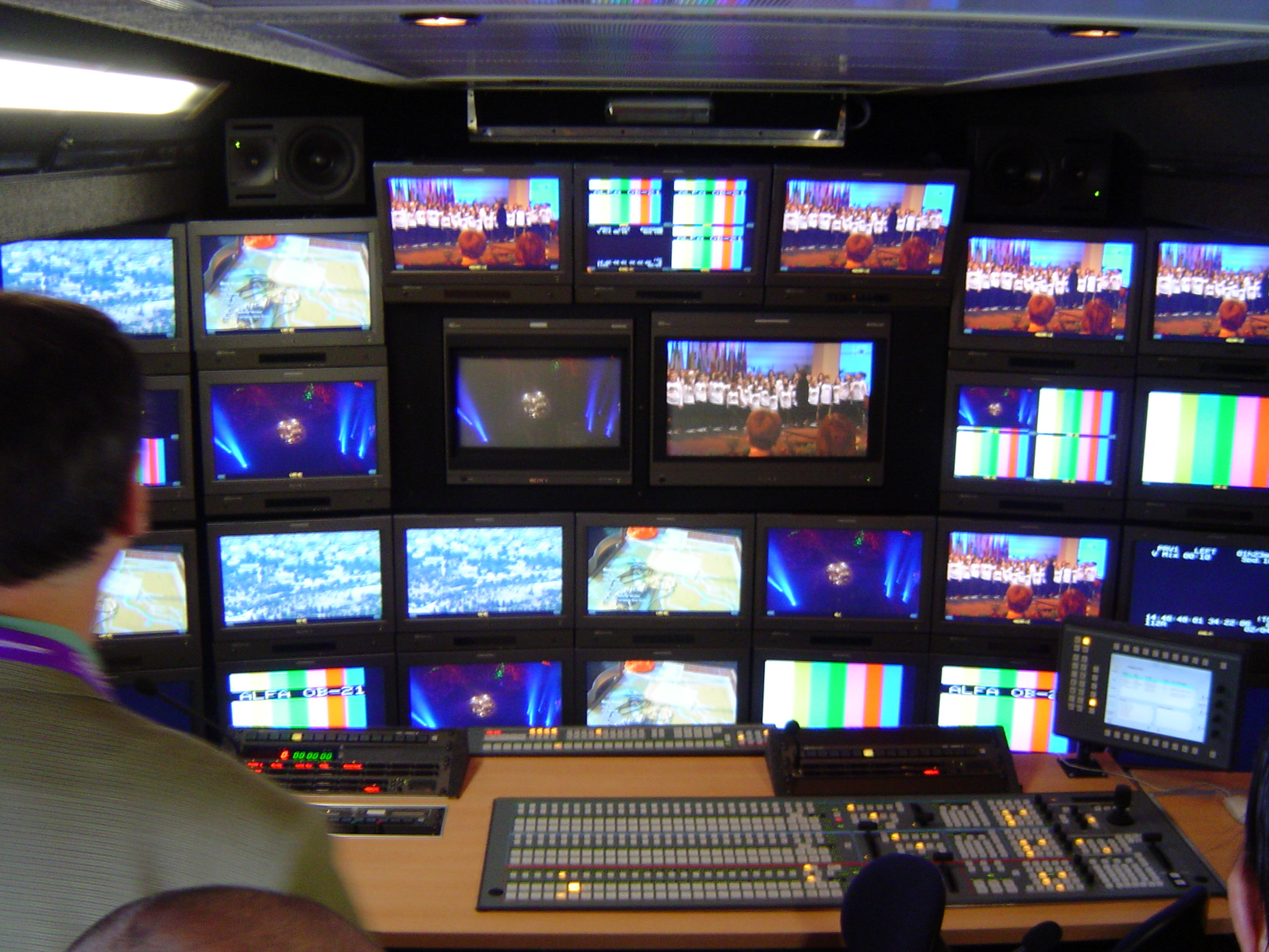 Een kijkje in een OBV van alfacam. Gemaakt op de IBC 2004.